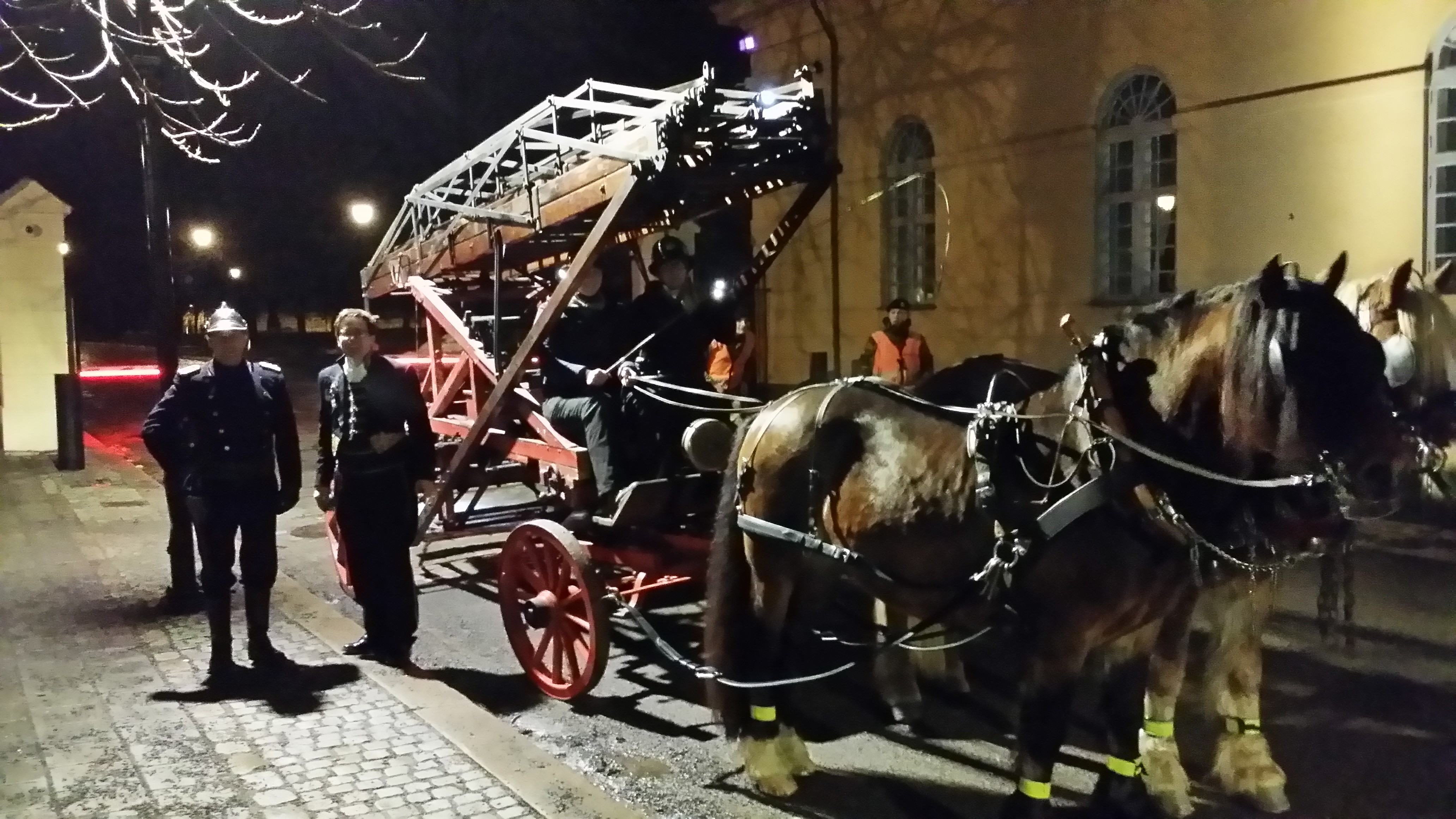 Stigebil fra Oslo Brannmuseum, 1856